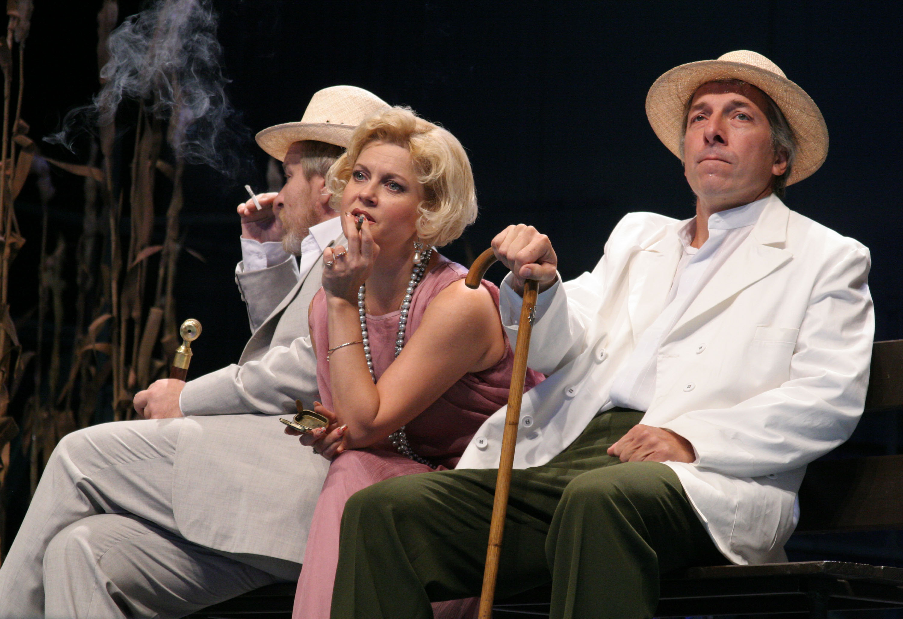 Сцена из спектакля Саратовского академического театра драмы «Чайка». Актёры Виктор Мамонов, Эльвира Данилина, Юрий Кудинов.